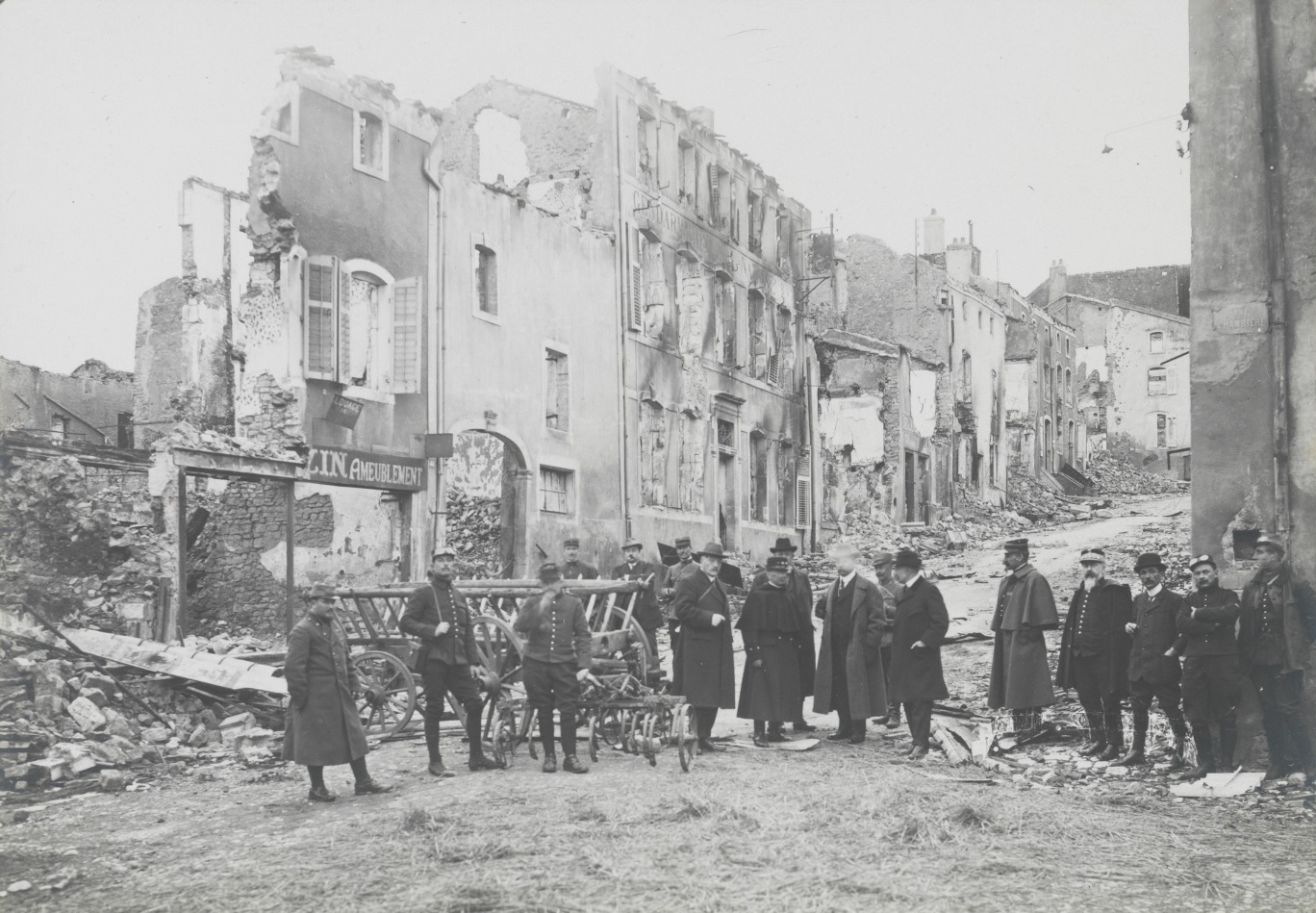 Communes incendiées ou détruites par fait de guerre fin août-début septembre 1914. Groupe d’enquêteurs et membres de la Commission au milieu des ruines de Nomeny (Meurthe-et-Moselle)